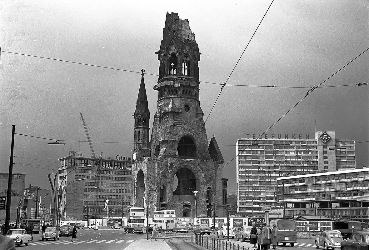 Blick von der Tauentzienstraße auf die Kaiser-Wilhelm-Gedächtniskirche in Berlin-Charlottenburg.